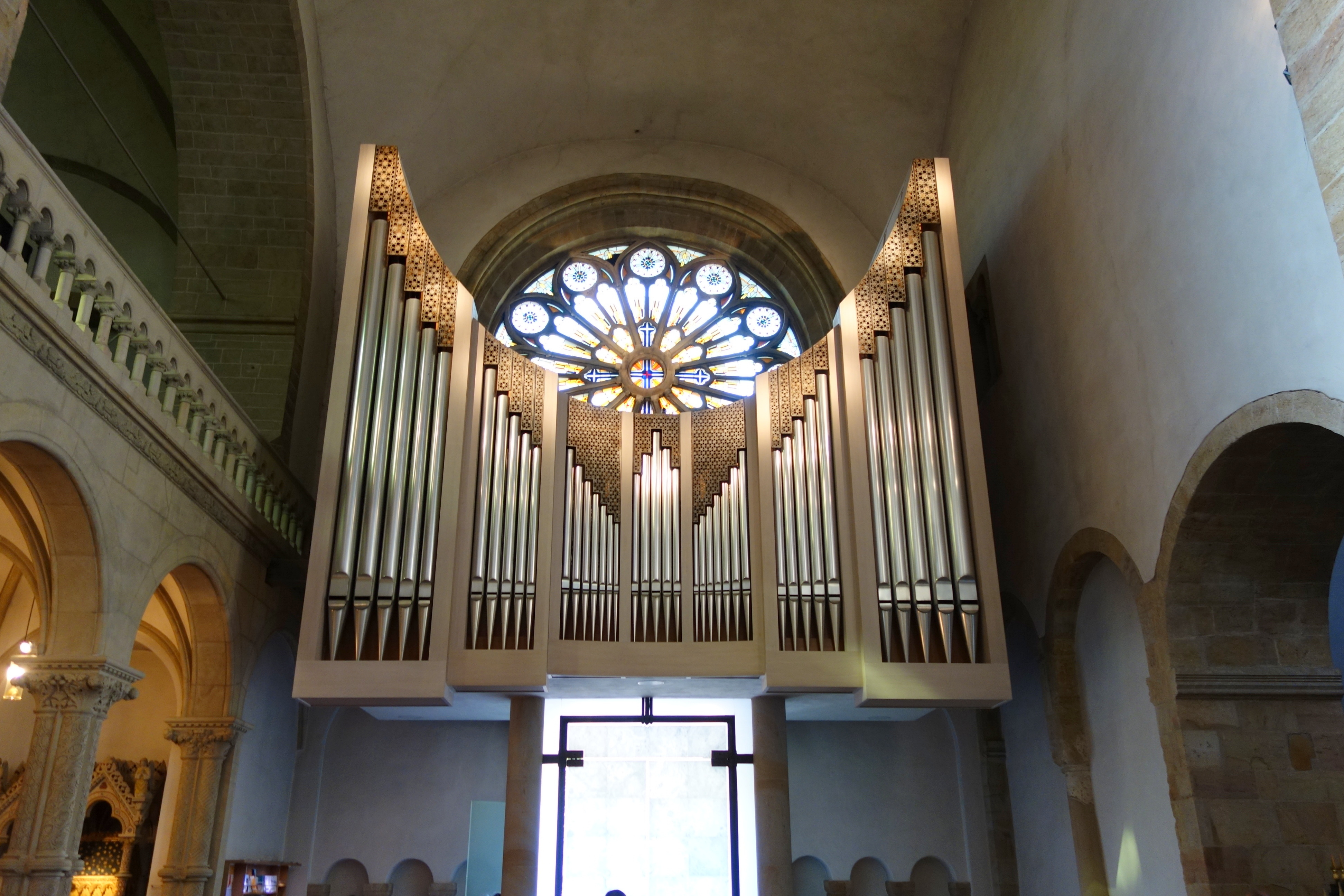 Dom Osnabrück, Niedersachsen, Deutschland